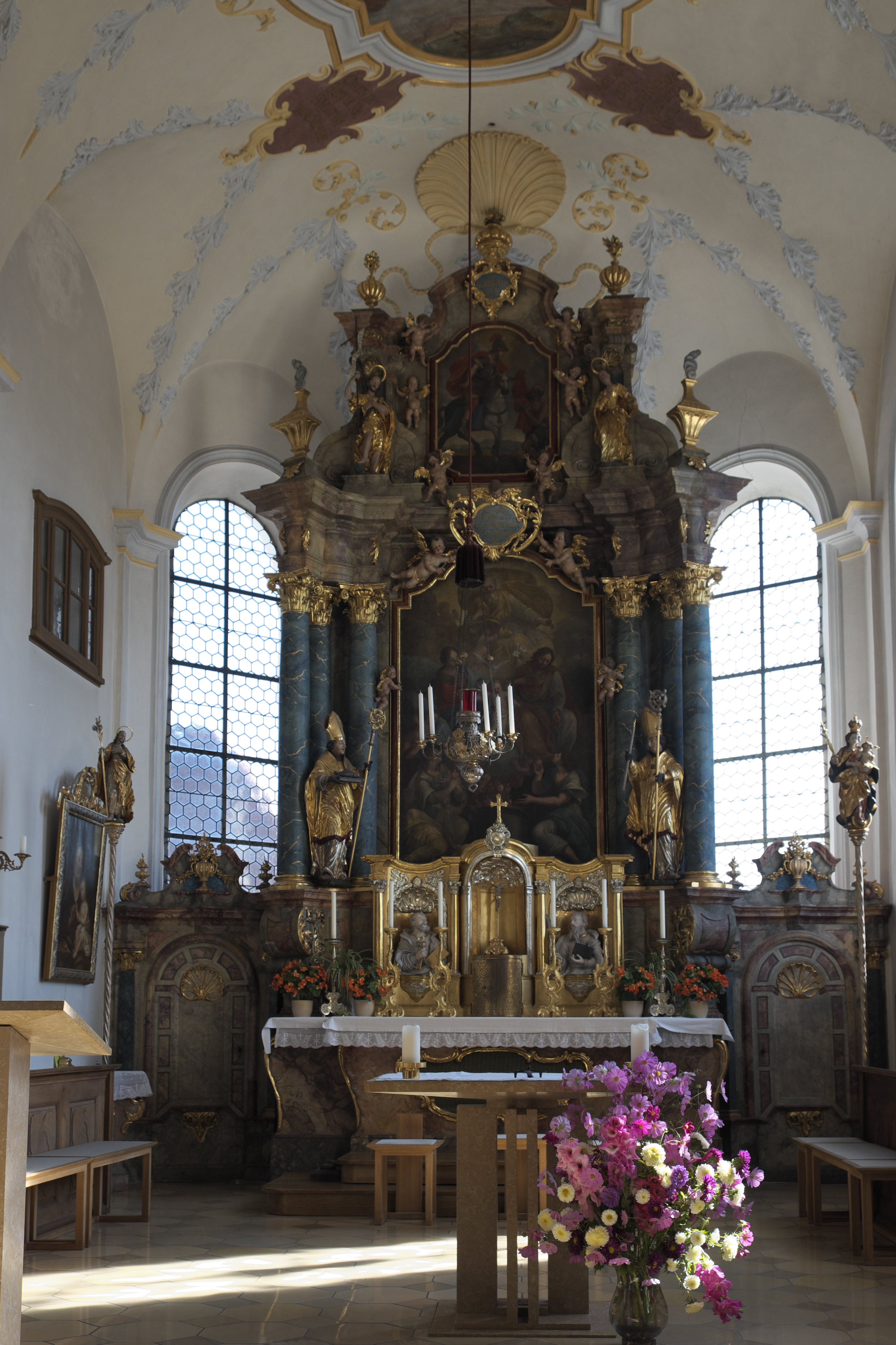 Katholische Pfarrkirche St. Martin in Penzing im Landkreis Landsberg am Lech (Bayern/Deutschland), Hauptaltar